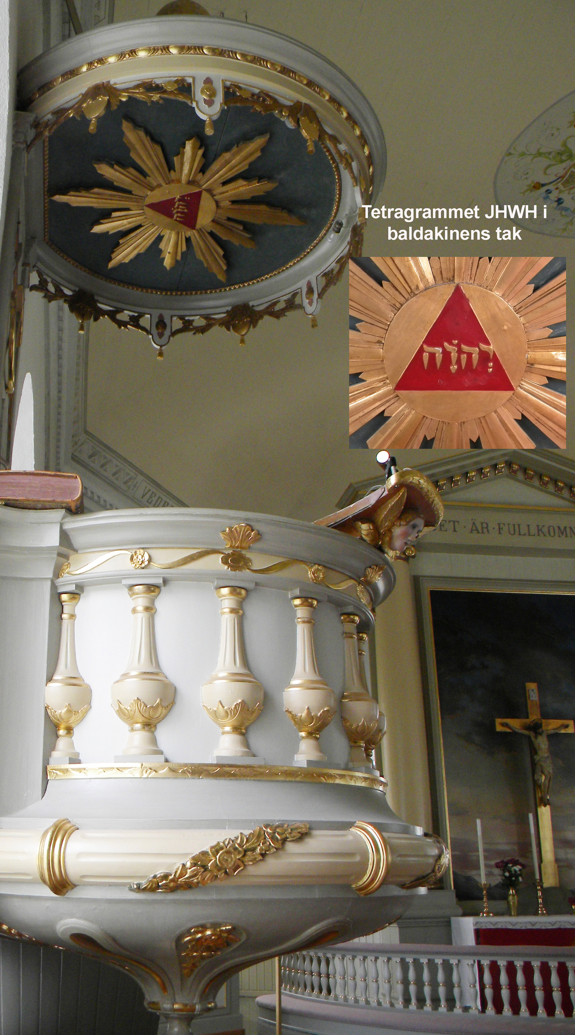 Predikstol i Skrea kyrka